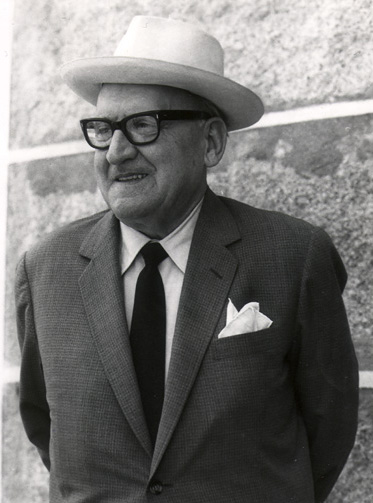 Albino Núñez Domínguez : Poeta : Ourense : Galicia : España